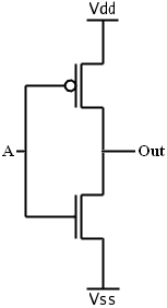 סכמה סטנדרטית, יצרתי בעצמי מסכמה אחרת